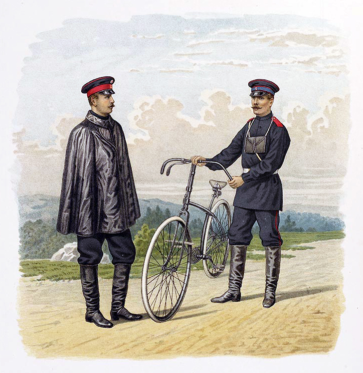 Нижние чины пехотных войск назначенные для службы на самокатах. Добавочное обмундирование нижних чинов для езды на самокатах: 1) Рядовой в суконной рубашке и 2) Рядовой в непромокаемом плаще. ( приказ по воен. вед. 1882 г. № 201 )